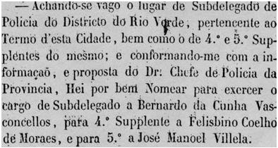 autorização